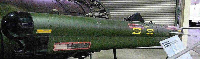 Tornado Self Protection Jammer, eigenes Bild